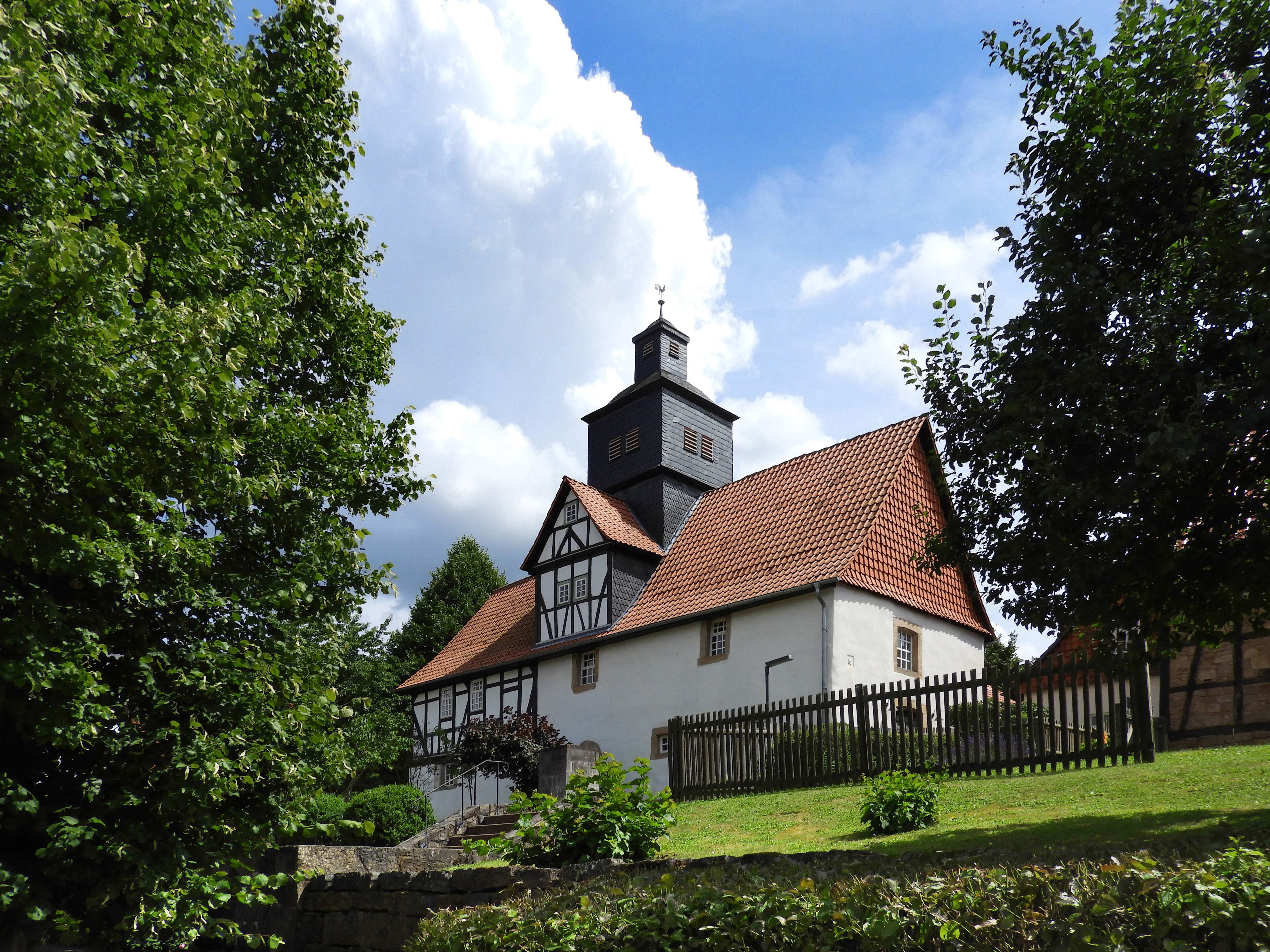 Die im Kern mittelalterliche evangelische Pfarrkirche von Rambach wurde im 17. Jahrhundert erweitert und 1711 durch einen Fachwerkaufbau erhöht. Im Jahr 1799 wurde die Dorfkirche grundlegend umgestaltet und mit einem Dachtürmchen versehen. Das Innere der Kirche überrascht mit reich verzierten umlaufenden Emporen und einer Orgel aus dem Ende des 18. Jahrhunderts. Als Kleinod gilt auch die Barock-Kanzel die um 1700 entstanden ist. Wegen ihrer künstlerischen, baulichen und geschichtlichen Bedeutung ist die Kirche ein geschütztes Kulturdenkmal.